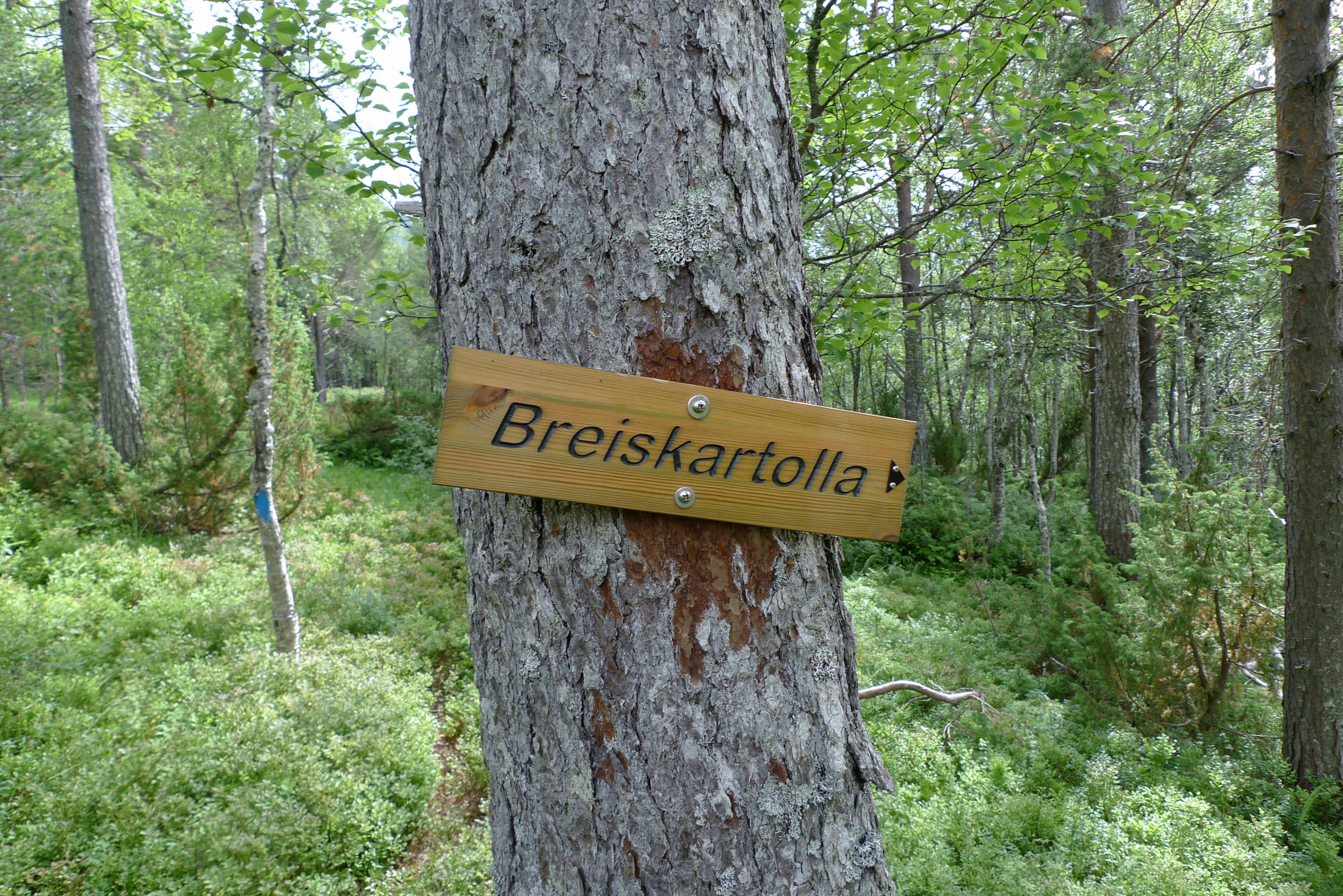 Skilt til Breiskartolla, som påstås å være Norges største furutre.